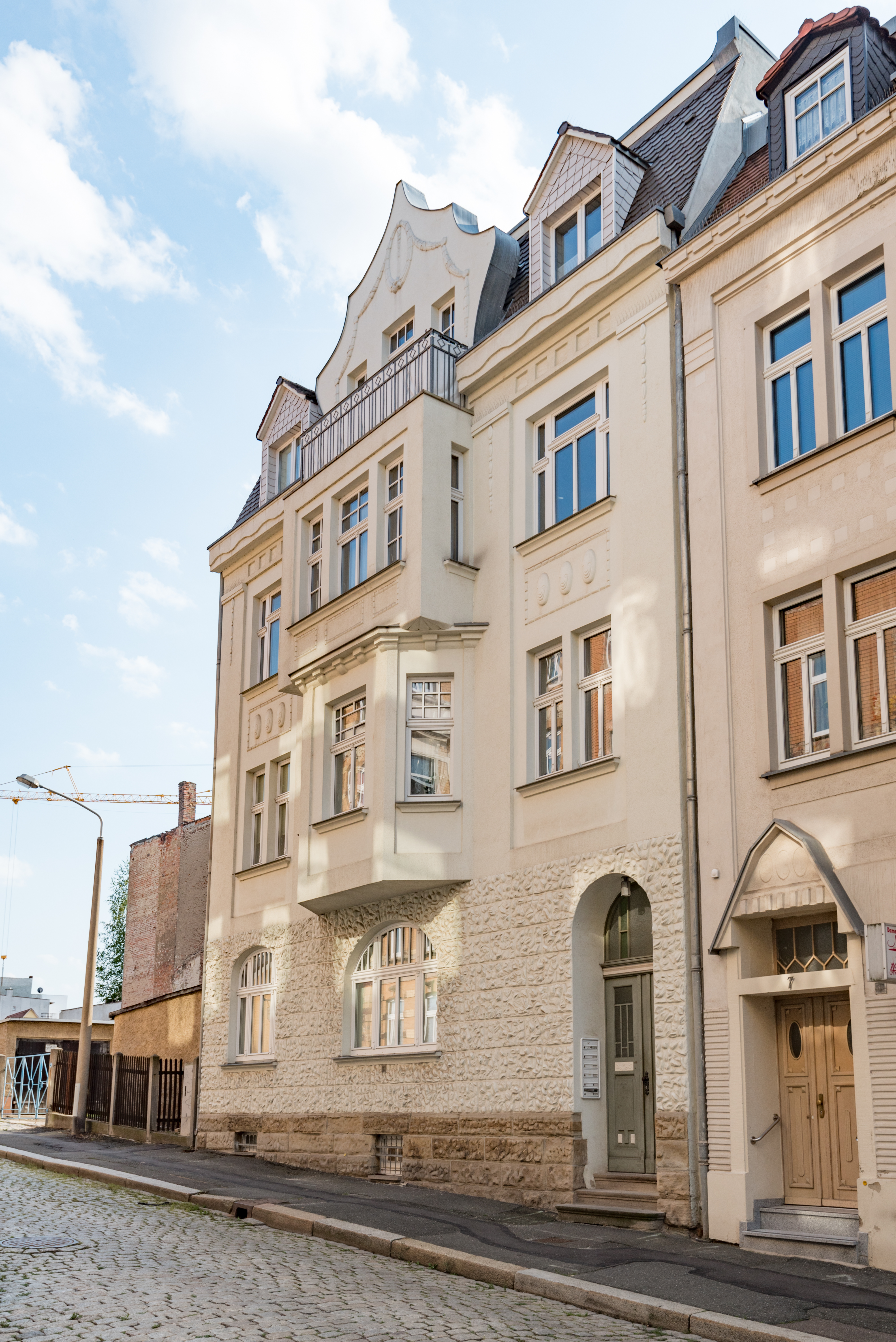 Zeitz, Einsteinstraße 8